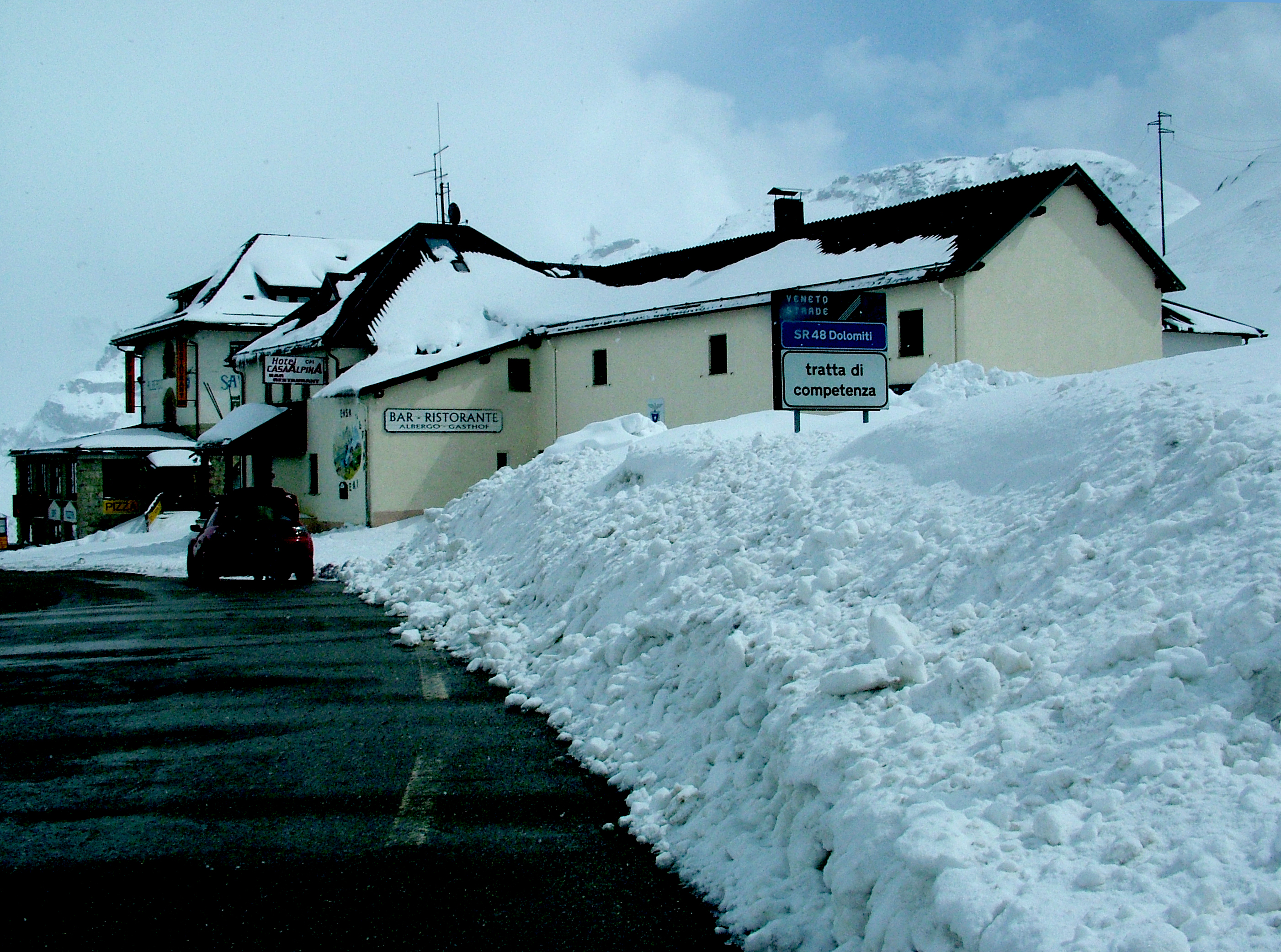 Pordoi-hágó, olasz Alpok